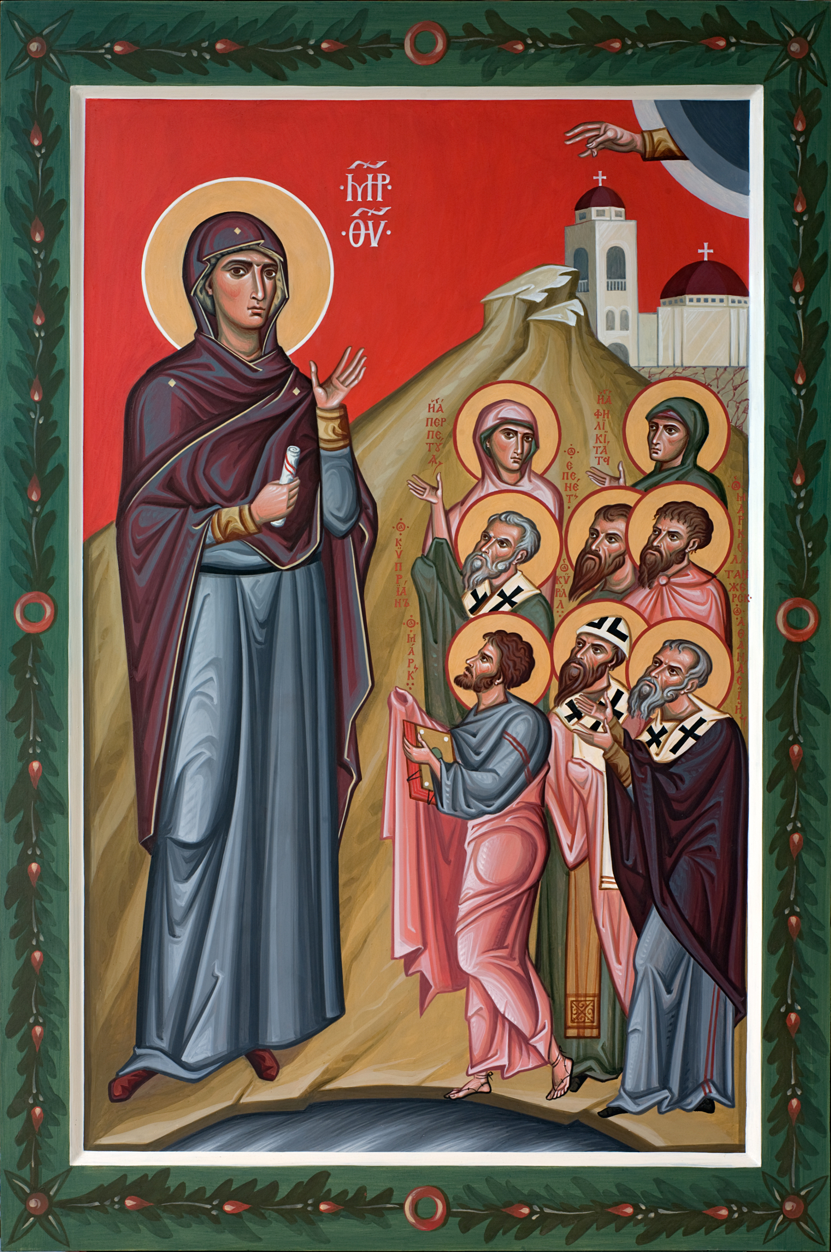 Икона Божией Матери с предстоящими североафриканскими святыми письма Ильи Иванкина